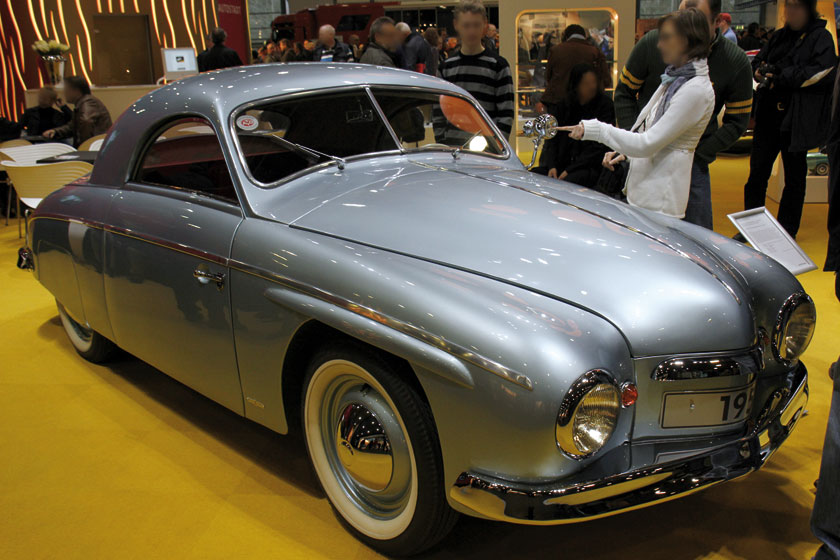 1951 Rometsch Volkswagen Beeskow Coupe_IMG_0921